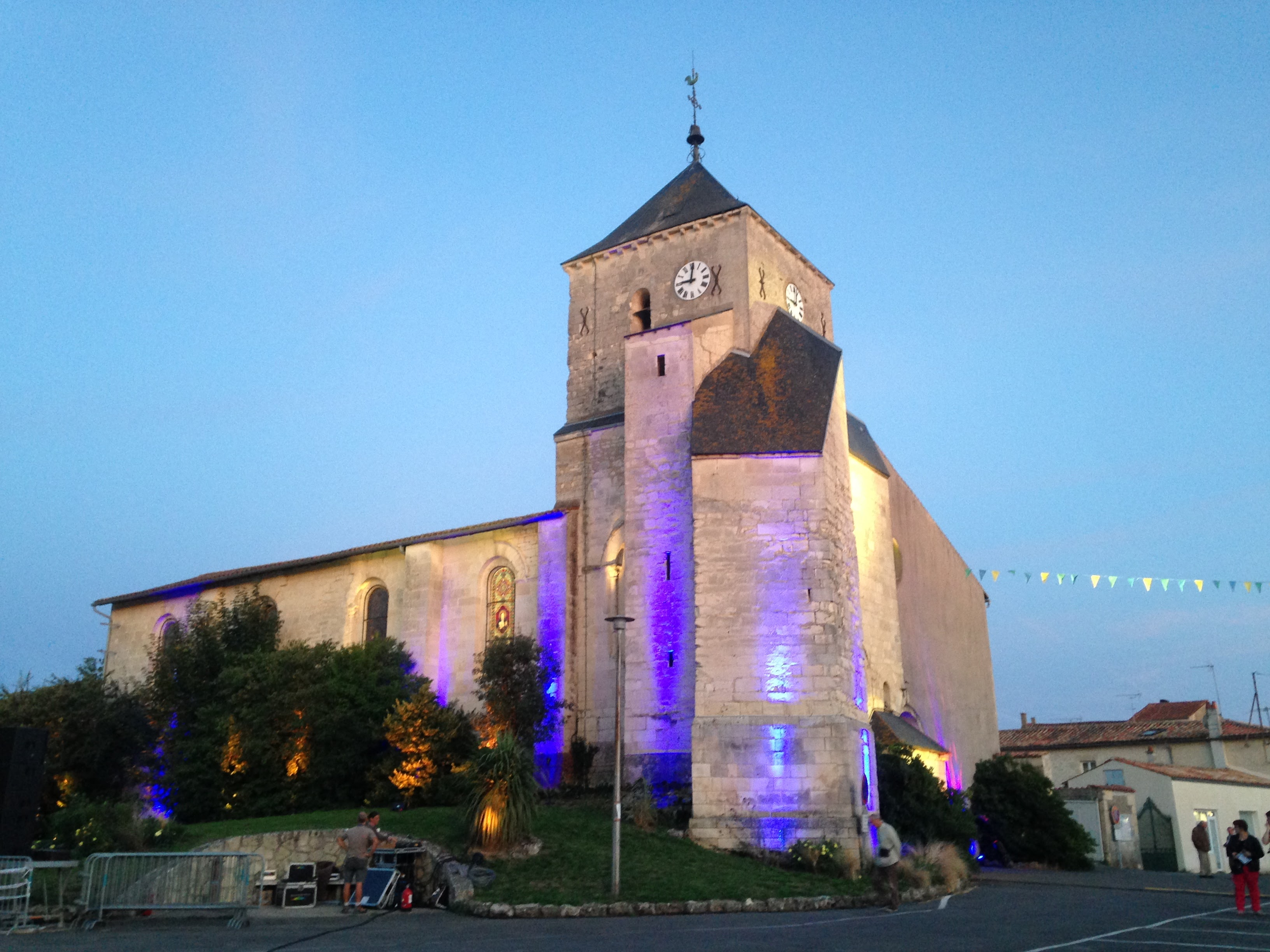 L'église mise en lumière lors des Nuits romanes